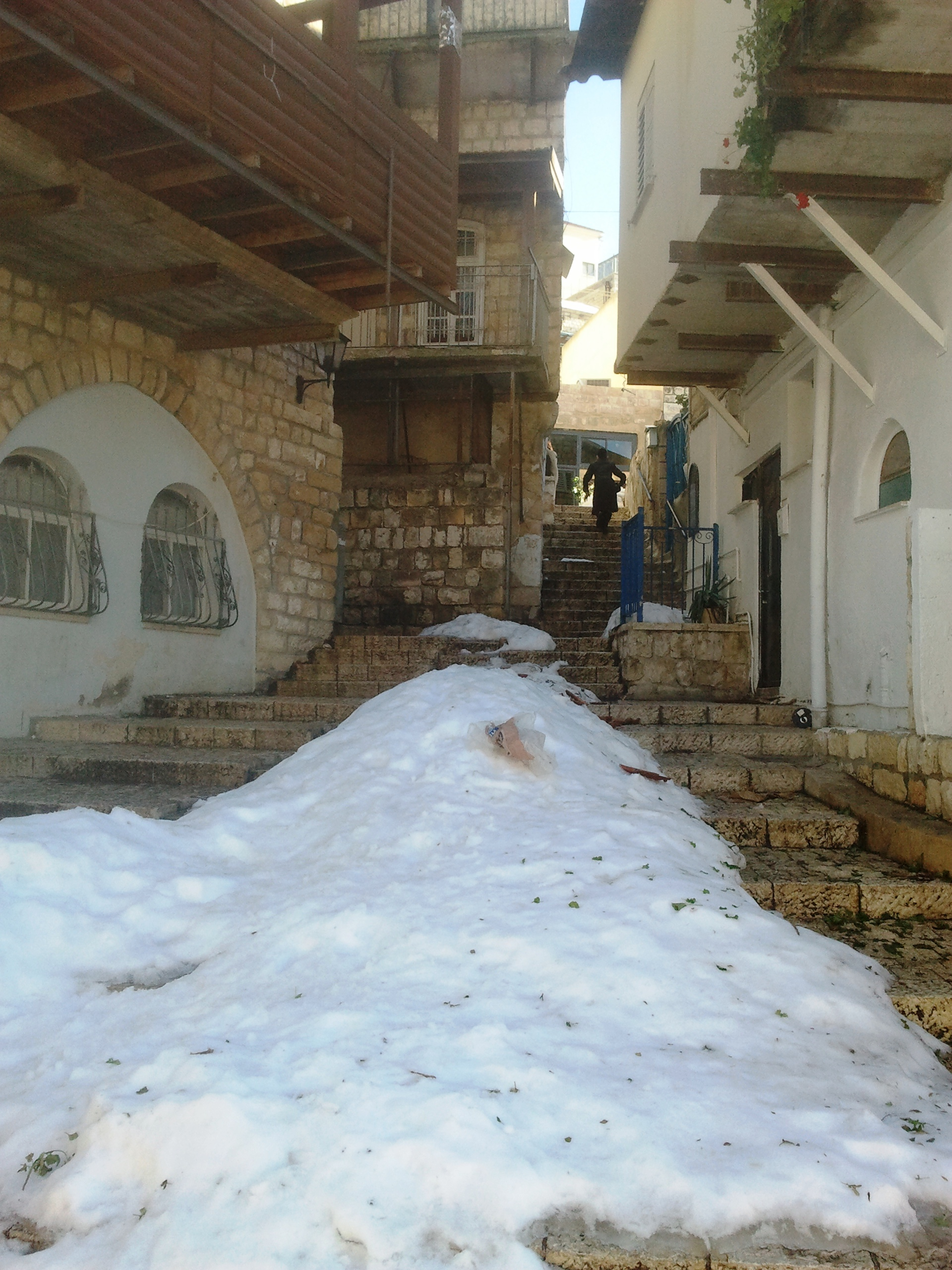 שרידי שלג בצפת בהרים וברחובות שבוע לאחר הסערה הגדולה בדצמבר 2013 ברחובות העיר העתיקה